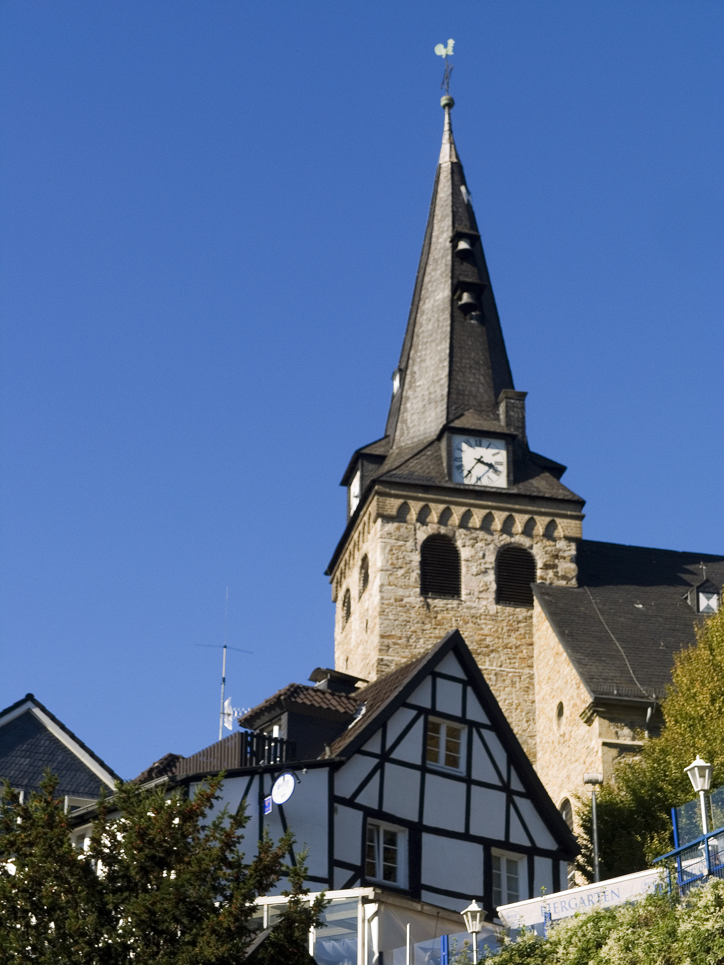 Северный Рейн - Вестфалия, Эссен, Кеттвиг - Евангелическая церковь